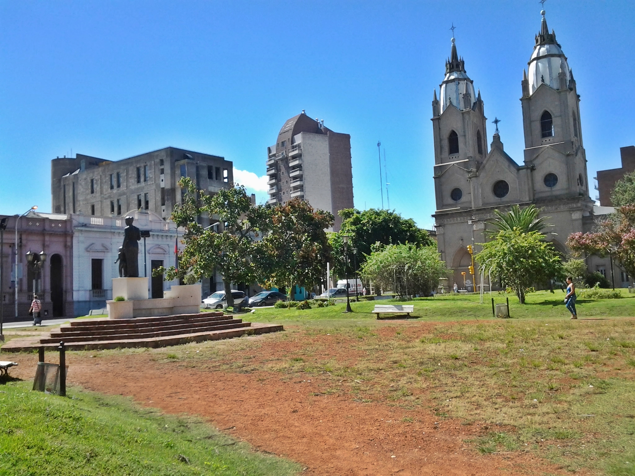 Plaza Alvear e Iglesia San Miguel en Paraná, ER, Argentina.